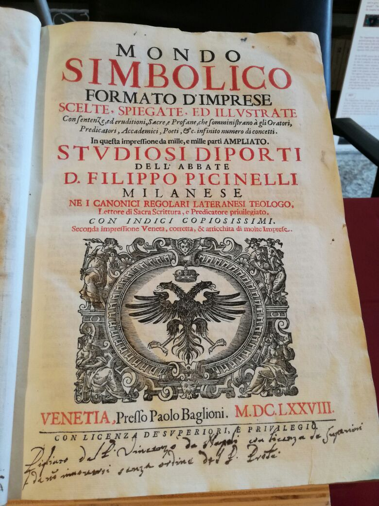 "Mondo Simbolico" di Filippo Picinelli, 1653 (Venezia, Paolo Baglioni, 1678), conservato presso la Biblioteca del Liceo Classico Agostino Nifo di Sessa Aurunca